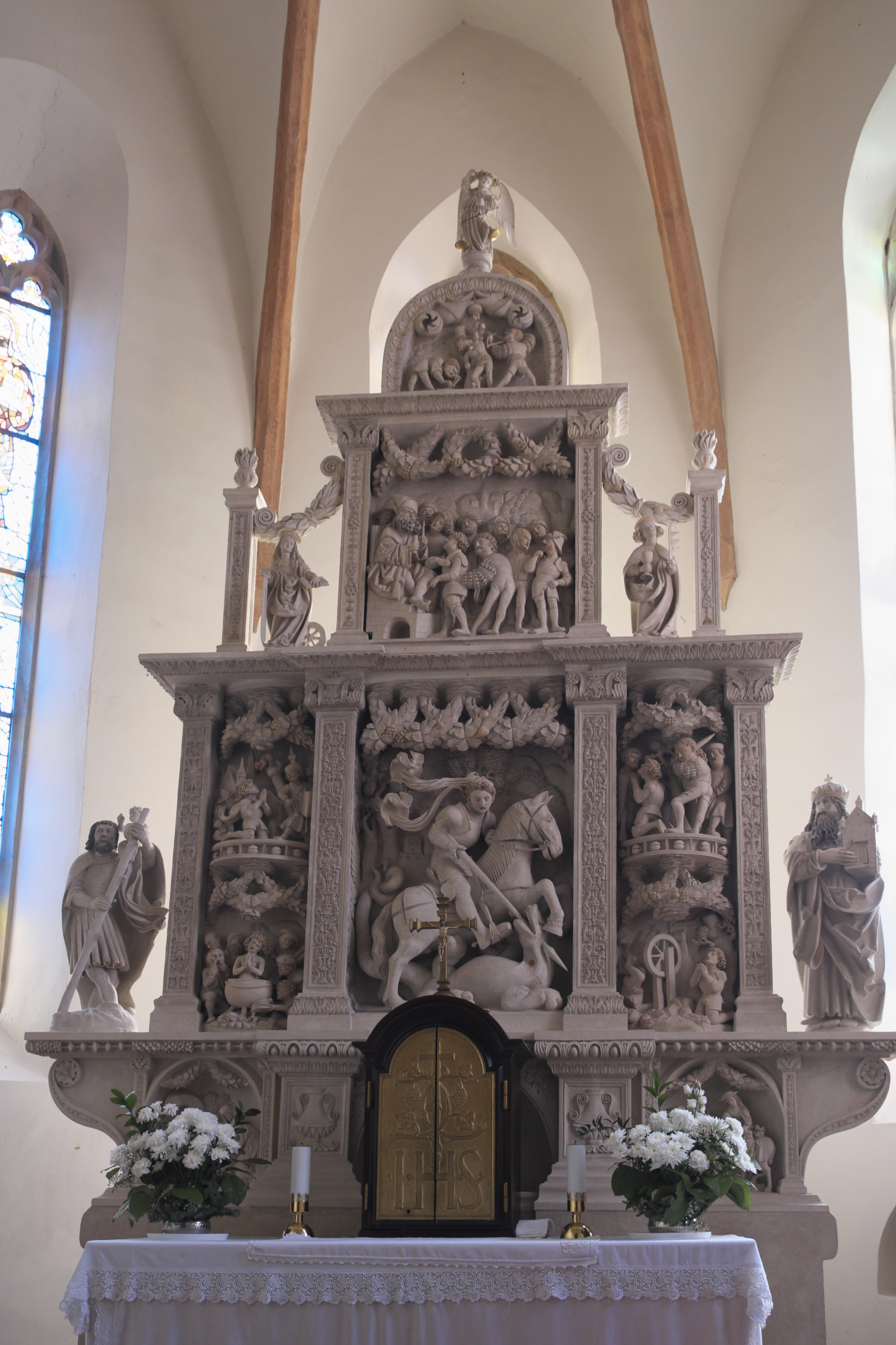 Katholische Pfarrkirche St. Georg in Svätý Jur (Slowakei), Georgsaltar aus weißem Sandstein von 1527